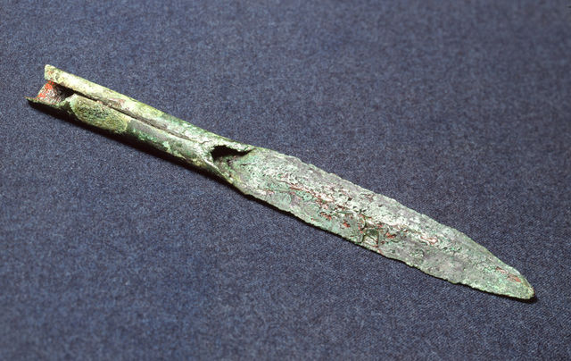 Pronssinen keihäänkärki